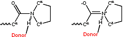 uk:?????????:??????????:?????